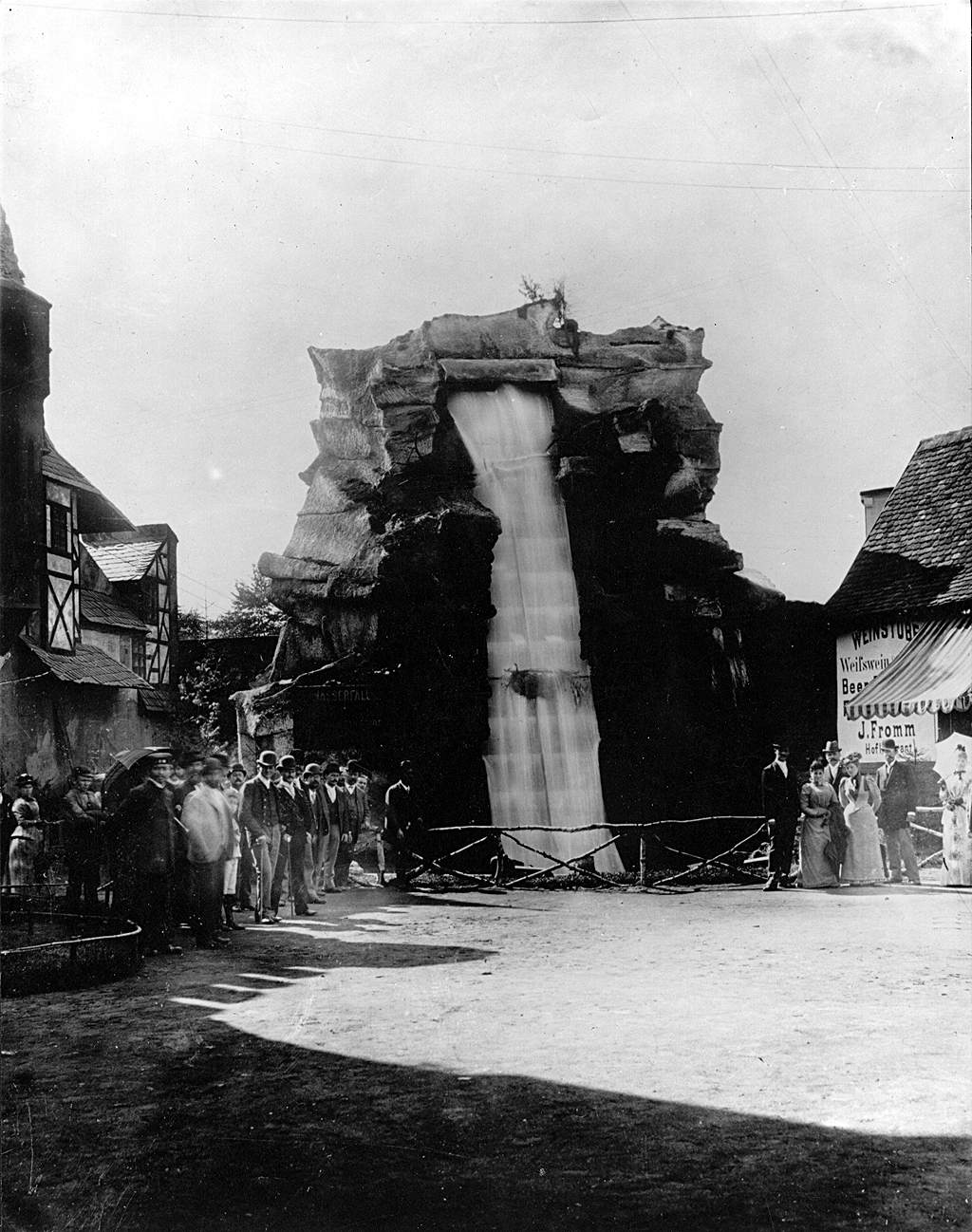 25. August 1891. Der künstliche Wasserfall der Internationalen Elektrotechnischen Ausstellung in Frankfurt am Main, angetrieben durch einen 100kW Drehstrommotor, dessen Energie über eine 175 km lange Überlandleitung aus Lauffen am Neckar übertragen wurde.